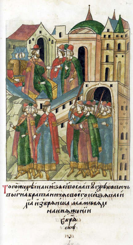 ЛИЦЕВОЙ ЛЕТОПИСНЫЙ СВОД В том же году князь Святослав Глебович выгнал племянника своего князя Василия из Брянска, а сам сел на княжении в Брянске.